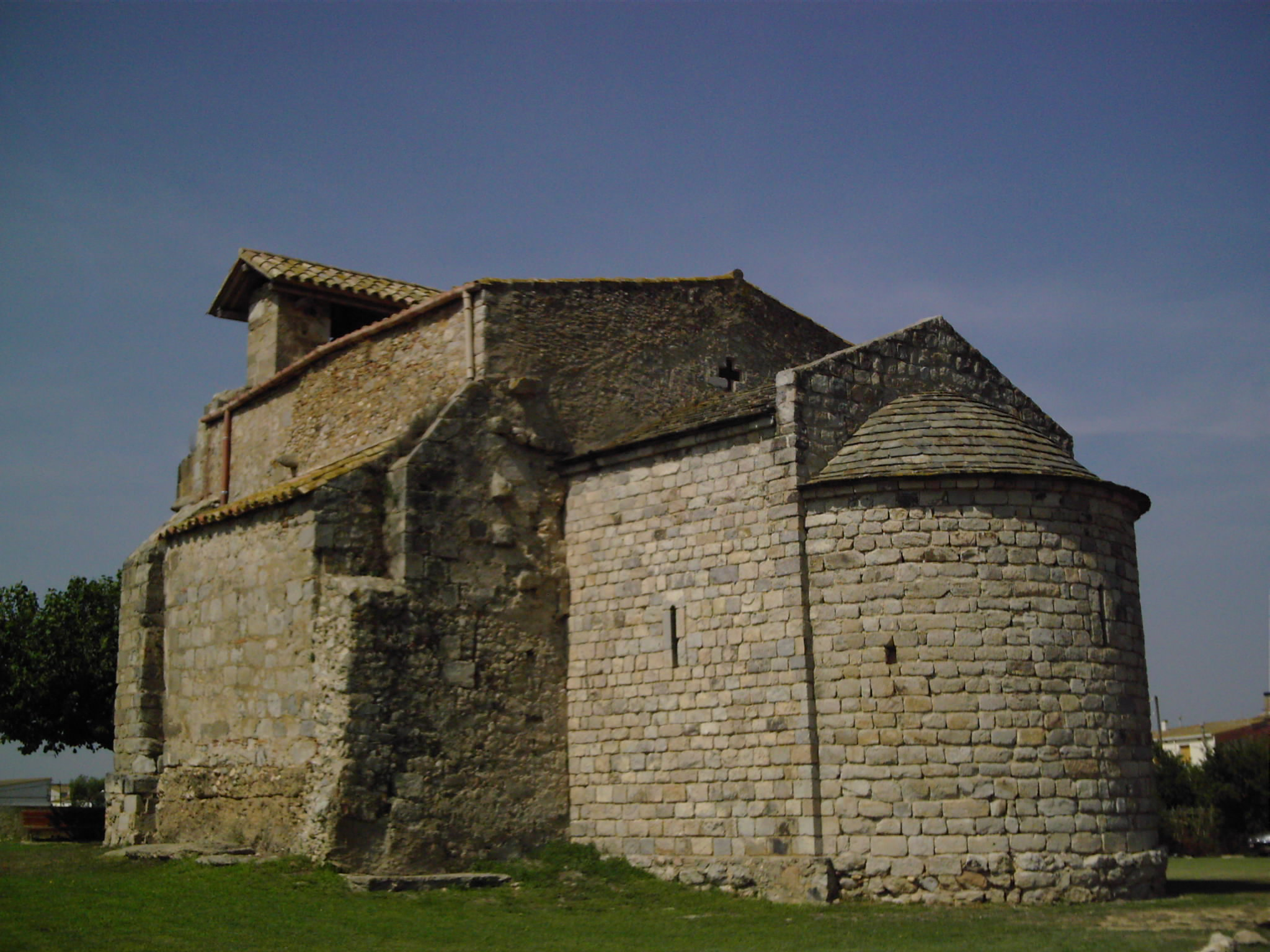 église de Vilamacolum (Alt Empordà)